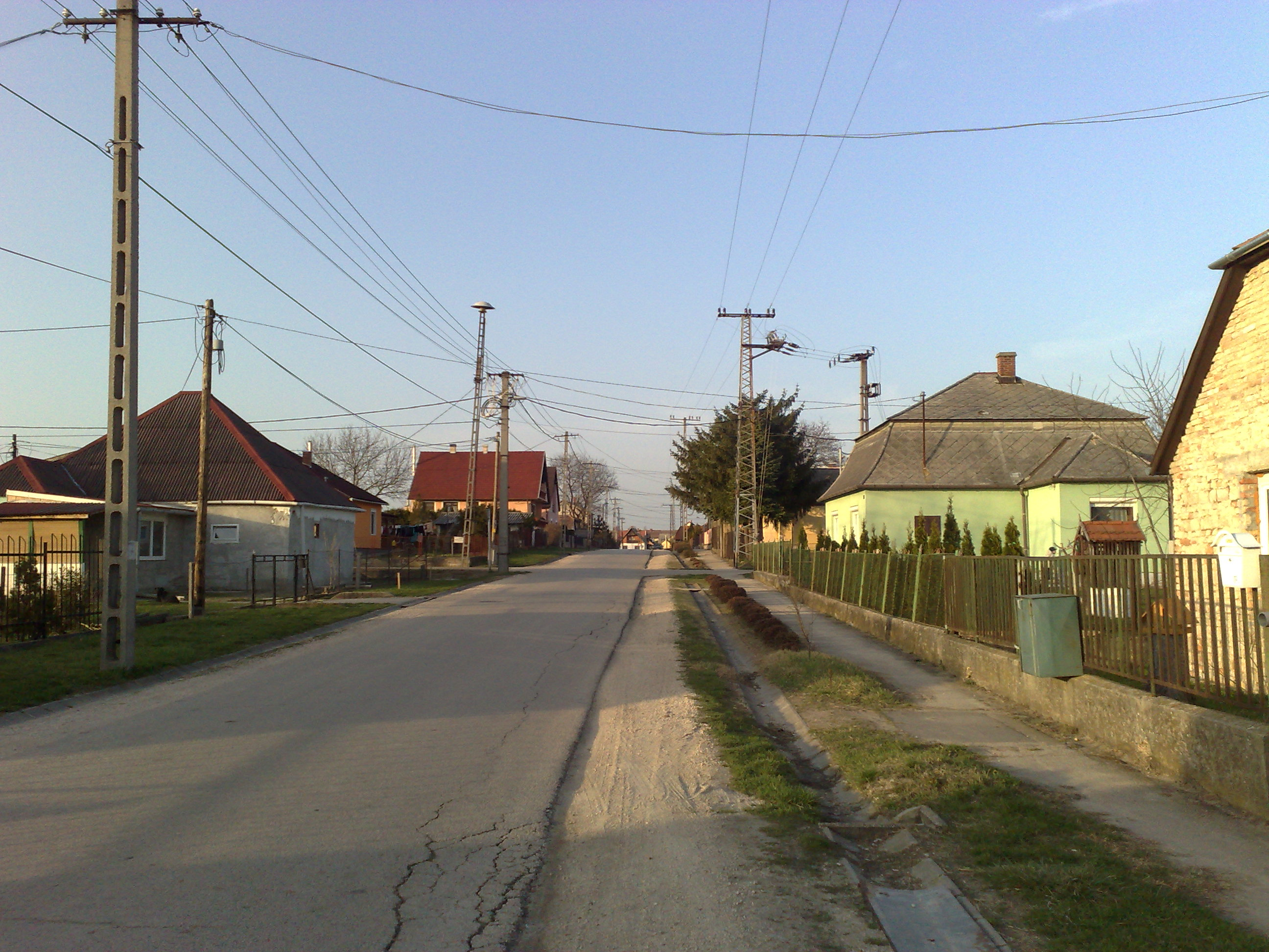 Petőfi Sándor utca